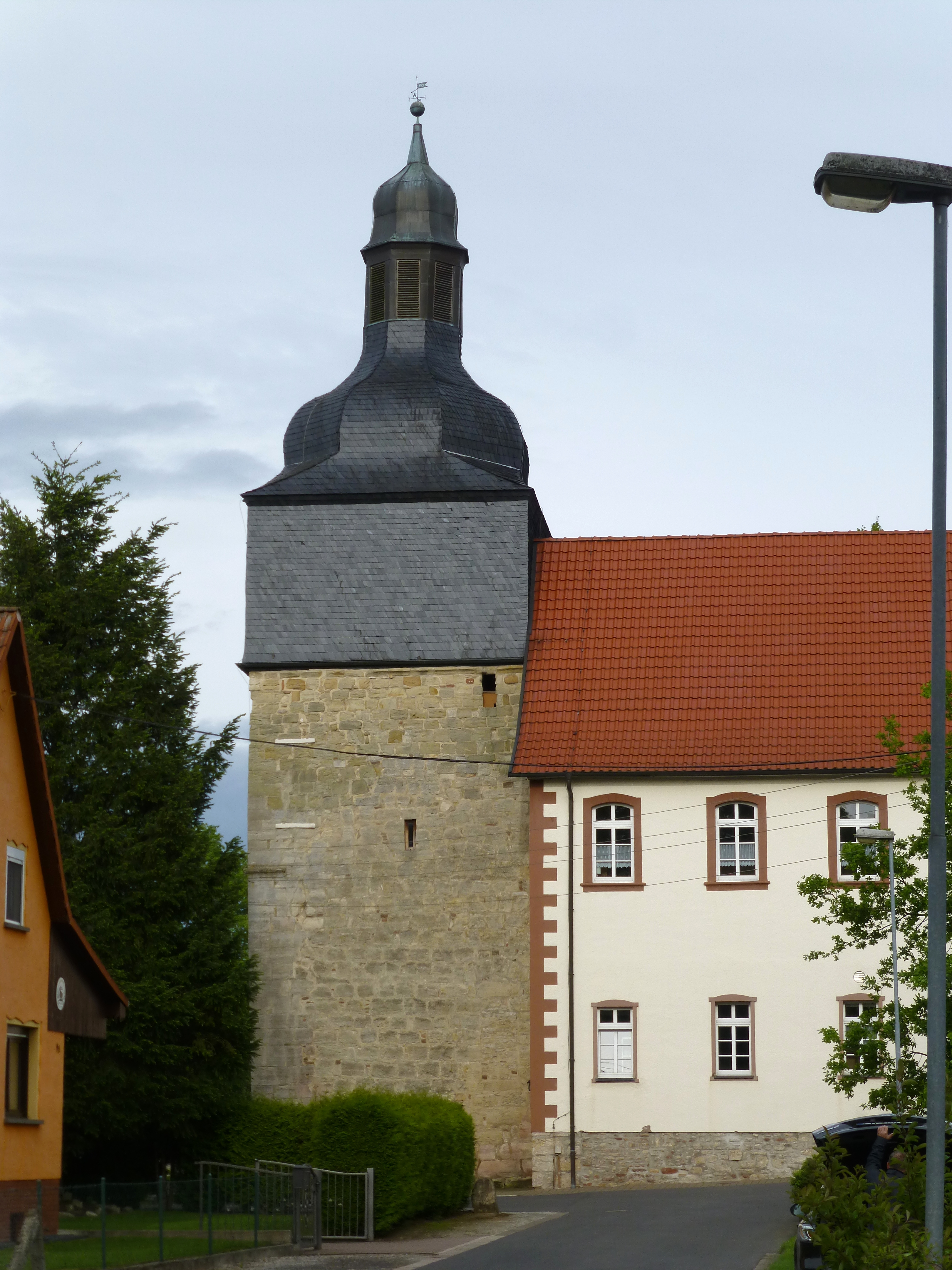 Kirchturm der profanierten Kirche St. Andreas im ehemaligen Zisterzienserinnenkloster Beuren, Landkreis Eichsfeld, Thüringen. Erbaut ab ca. 1140